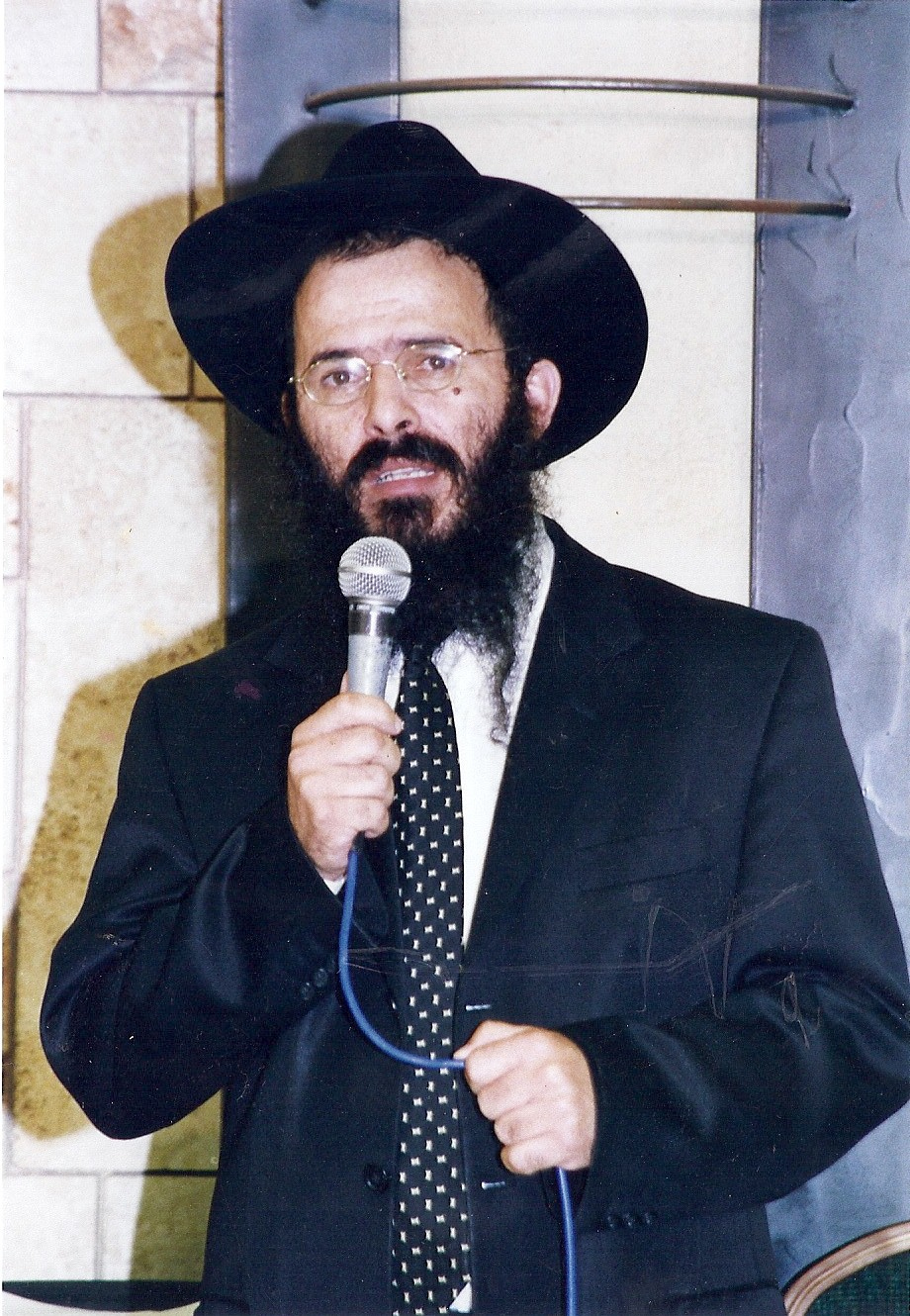 הרב נתן בוקובזה נואם בכנס התרמה